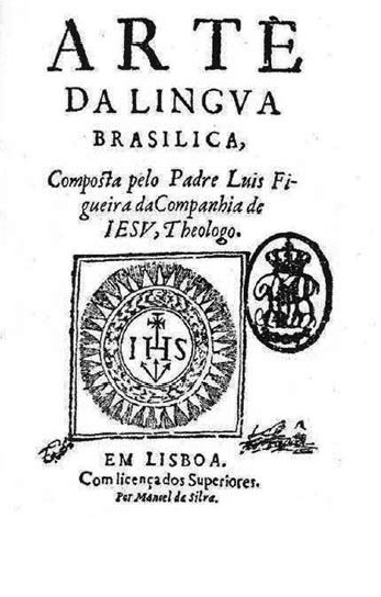 Capa da 1ª Edição do Livro "A Arte da Língua Brasílica" de Luís Figueira